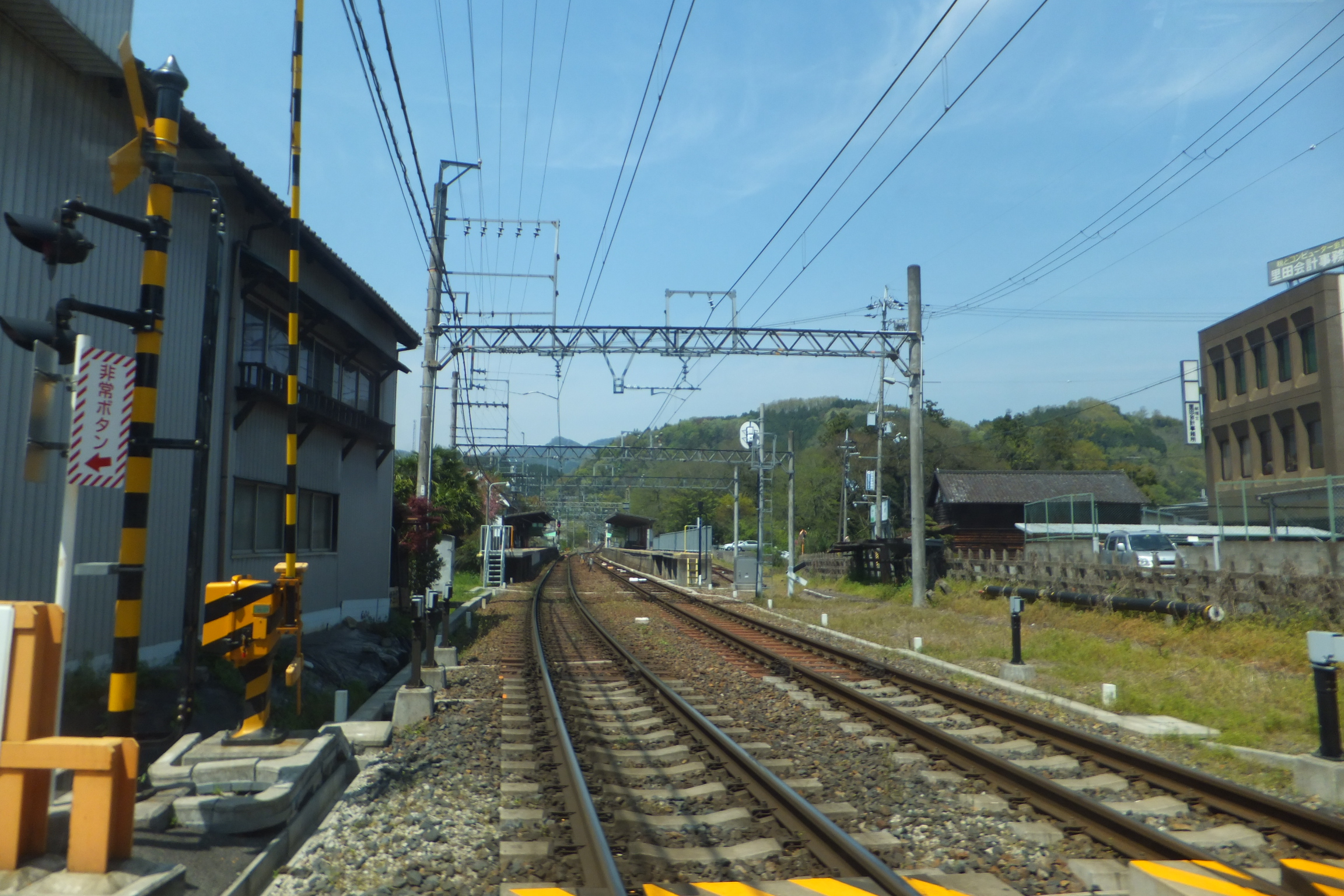 奈良県吉野郡吉野町丹治 近鉄吉野線